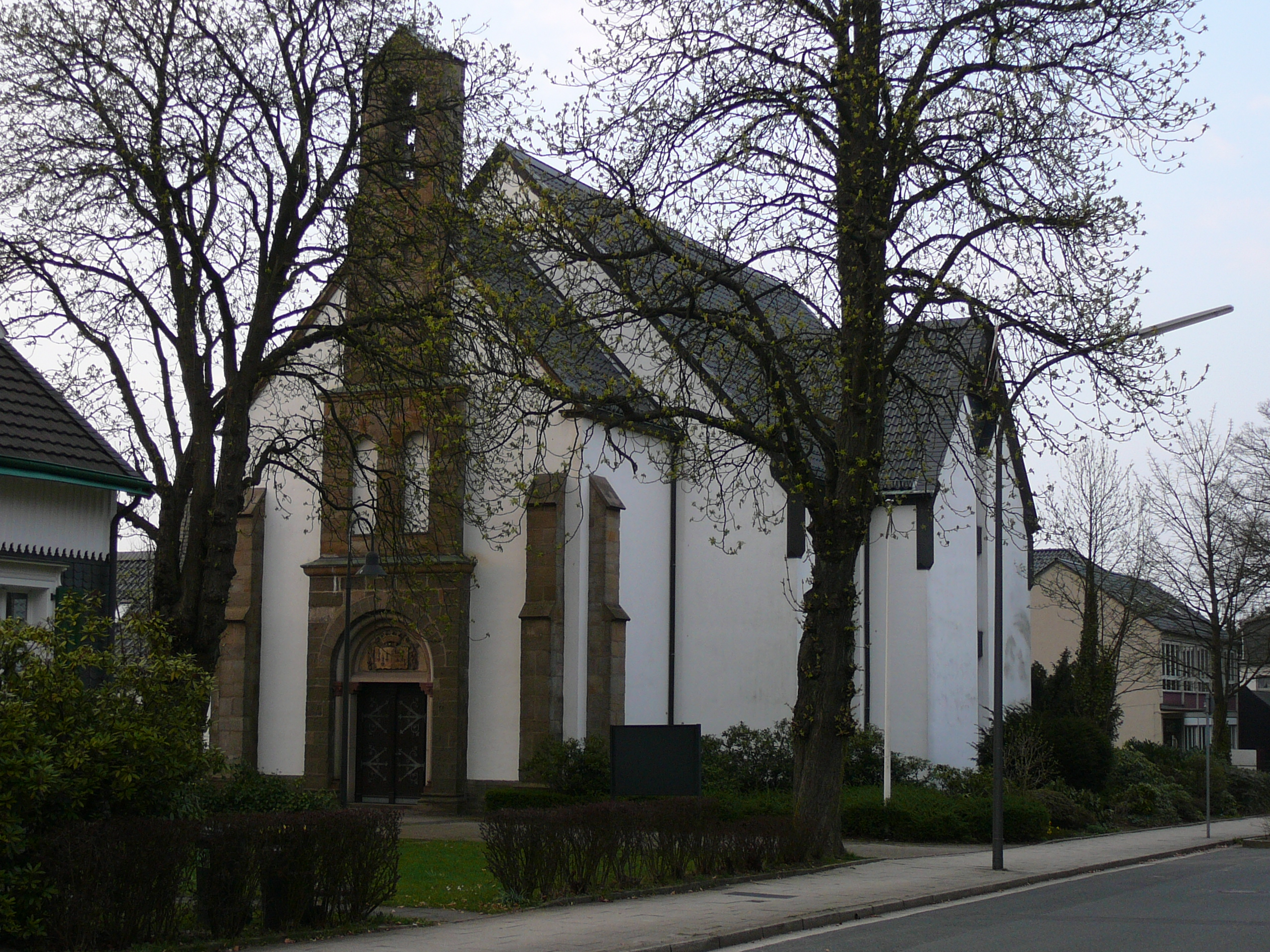 Höhenstraße, Wuppertal